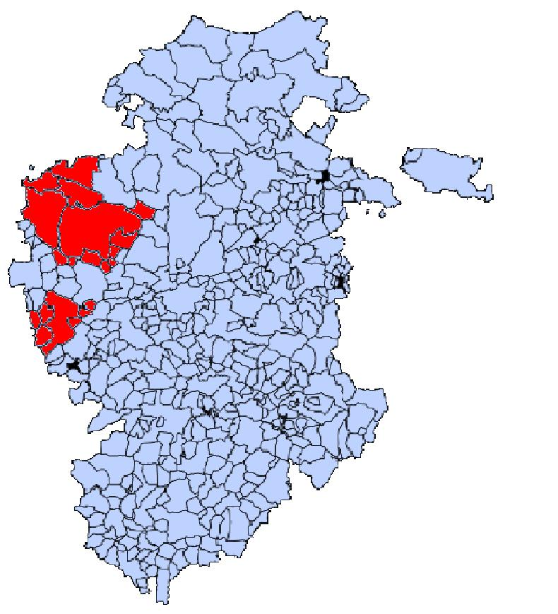 Municipios pertenecientes a la Mancomunidad de Peña Amaya